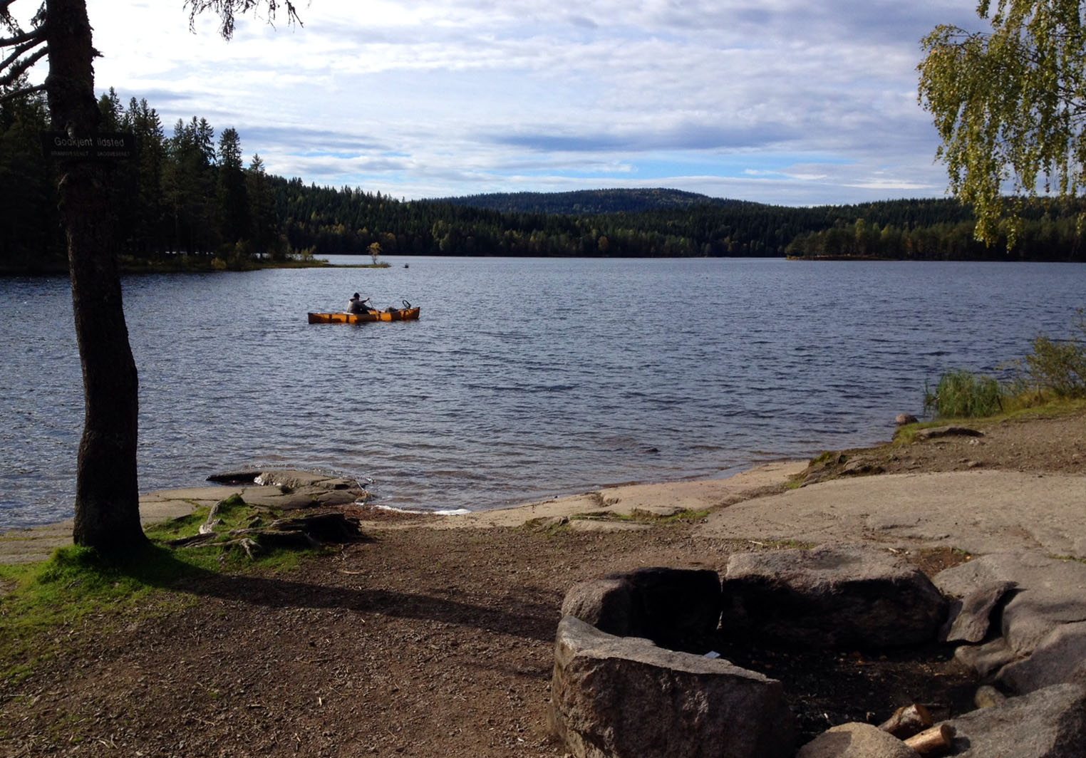 Øyungen, Nordmarka ved Oslo. Vannet sett mot nordvest fra en bålplass ved dammen i sørøst.